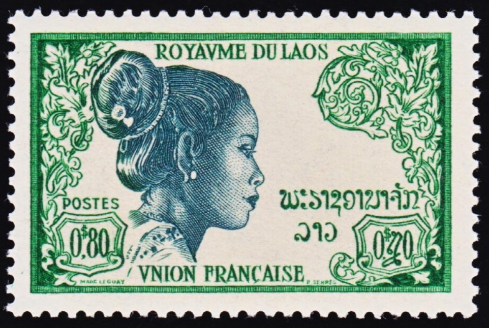 timbre du laos émis en 1952 et dessiné par marc Leguay